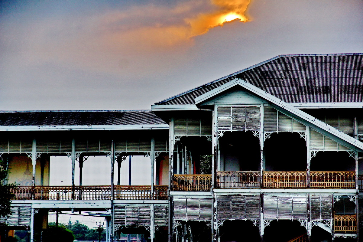 อาคารศาลากลางจังหวัดนนทบุรีหลังเก่าสร้างขึ้นในปี พ.ศ.2544 ในสมัยพระบาทสมเด็จพระมงกุฎเกล้าเจ้าอยู่หัว รัชกาลที่ 6 เป็นอาคารไม้สัก 2 ชั้น ทรงยุโรปยุคแรกสมัยรัตนโกสินทร์ (ทรงไทยประยุกต์) ประดับงานสลักไม้ลายวิจิตร เป็นอาคารหลายหลังเชื่อมติดกันเป็นรูปเหลี่ยมผืนผ้า มีสนามอยู่ตรงกลาง หลังคามุงกระเบื้องลูกฟูก มีรั้วเหล็กล้อมรอบ